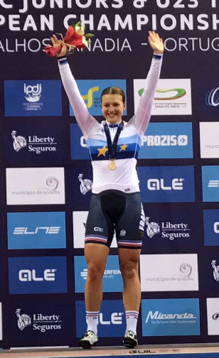 Mathilde Gros après une victoire aux championnats d'Europe